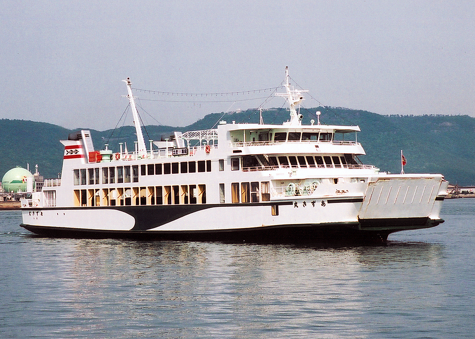 関西急行フェリー 高松－土庄航路フェリー あずき丸